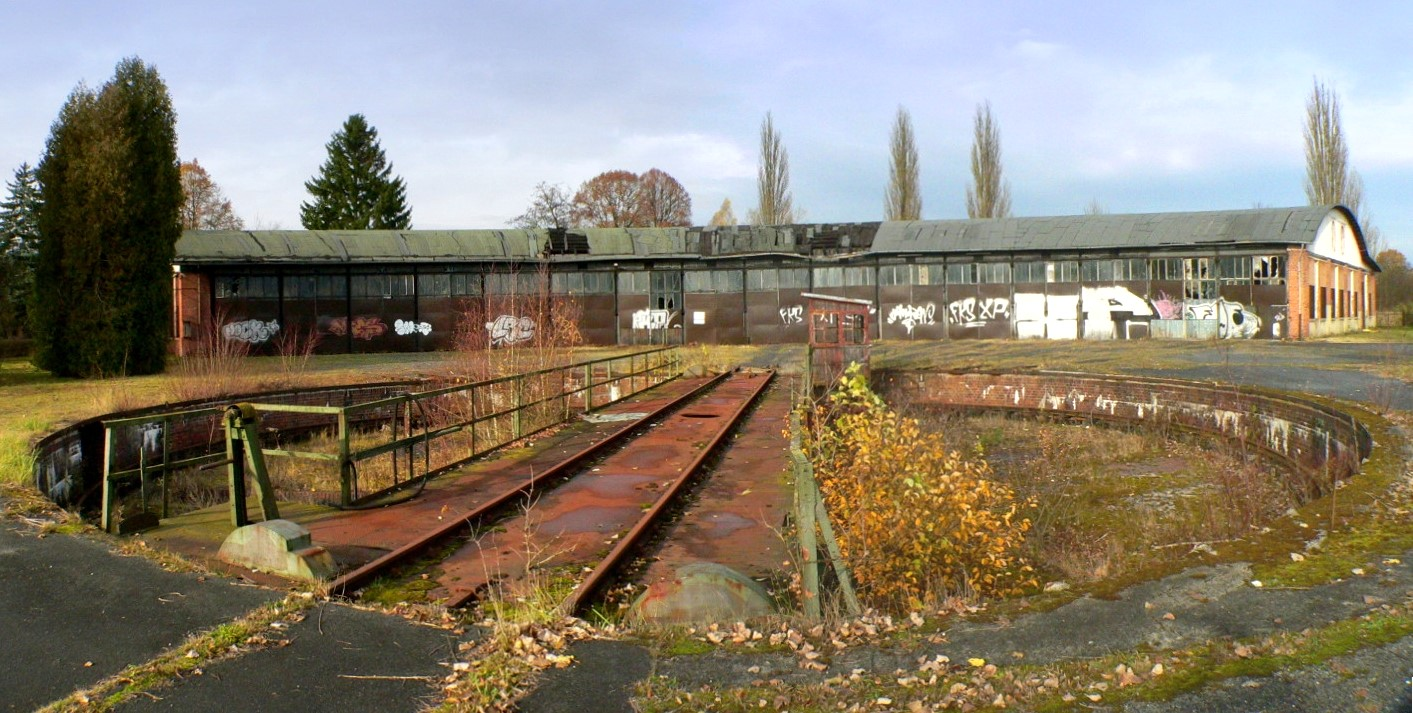 Coburg (Bayern), ehem. Bahnbetriebswerk, Ringlokschuppen und Drehscheibe, Objekte unter Denkmalschutz